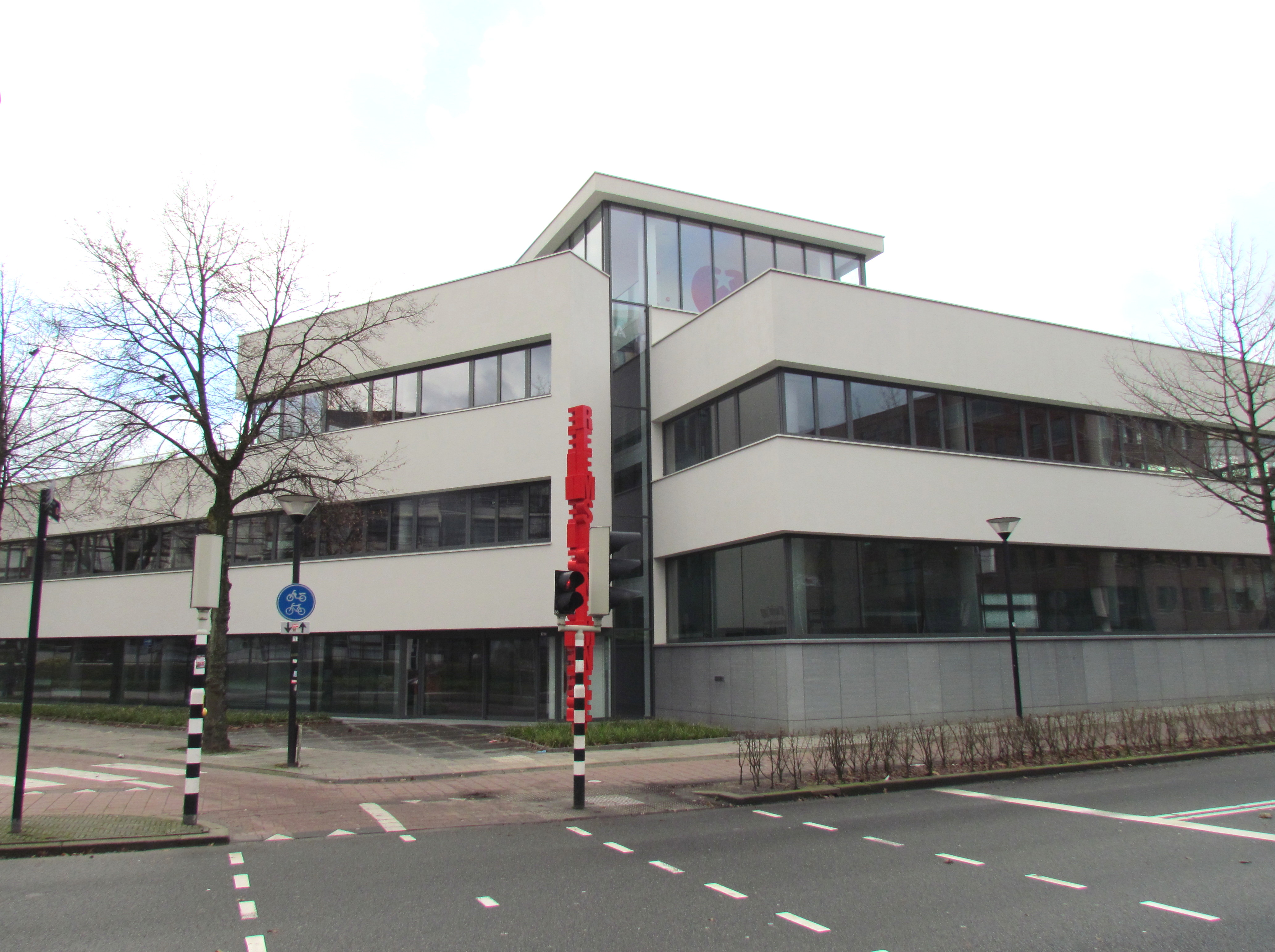 Partijbureau van de Socialistische Partij (Nederland) aan de Snouckaertlaan in Amersfoort